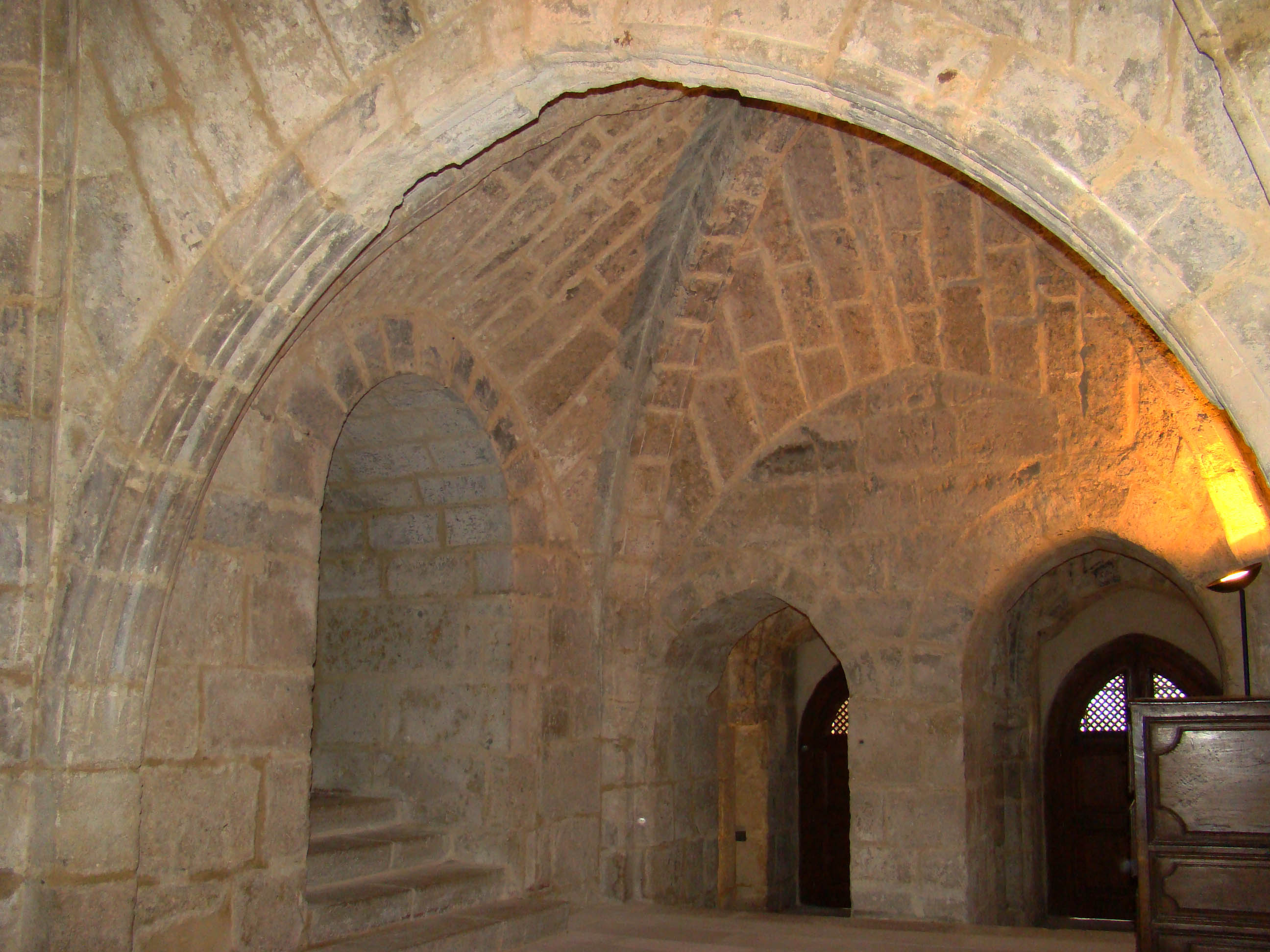 Monasterio cisterciense de la Santa Espina ubicado en la localidad menor llamada La Santa Espina del municipio de Castromonte en la provincia de Valladolid, España. Sacristía, del primer edificio románico del siglo XII. Esta estancia hizo las veces de iglesia en los comienzos de la construcción del monasterio.